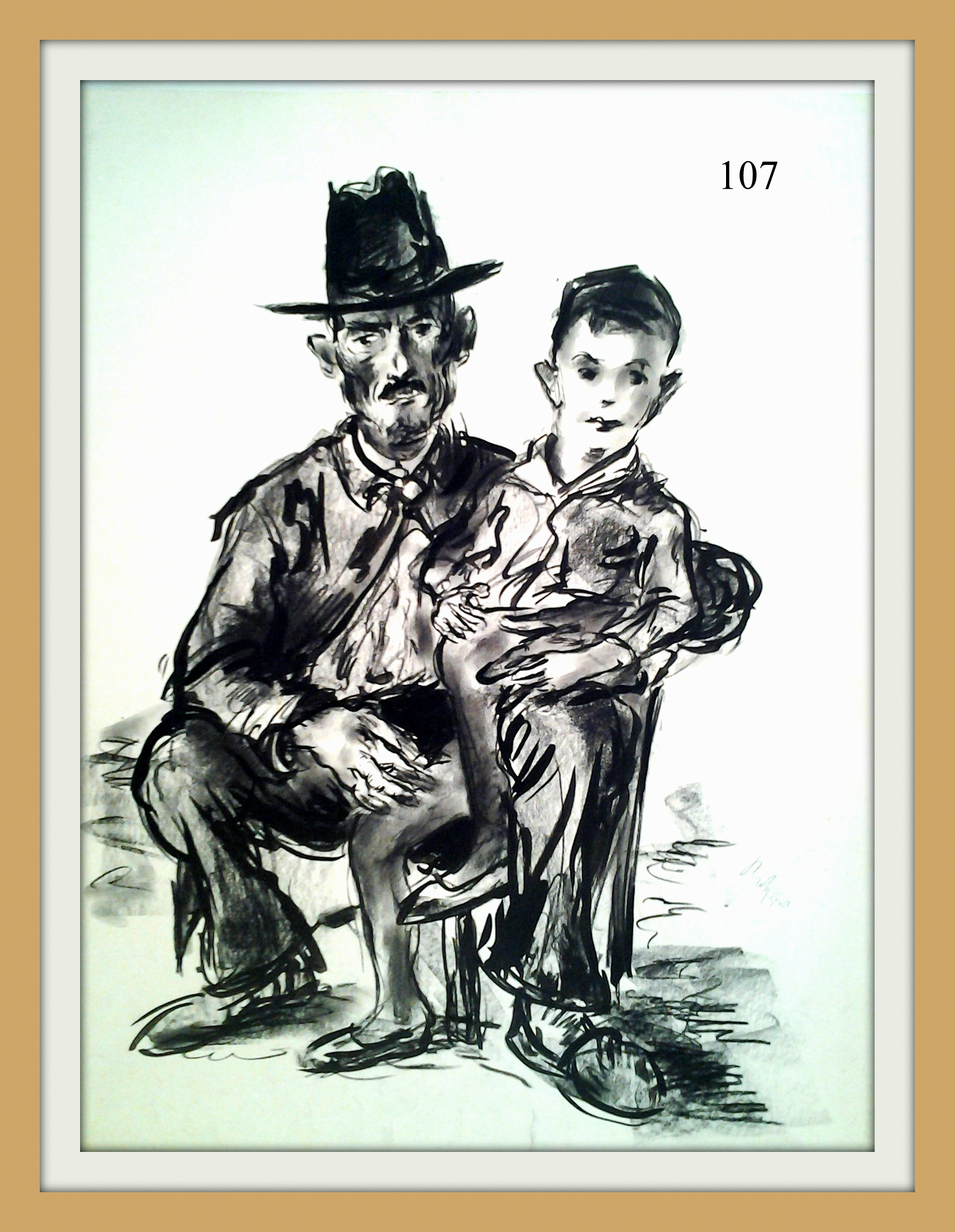 Dessin de Rolf Hirschland réalisé en Espagne entre 1933 et 1934. Dessin au fusain représentant un homme assis avec son fils